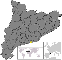 Localització de Vilanova i la Geltrú. Location of Vilanova i la Geltrú in Catalonia.